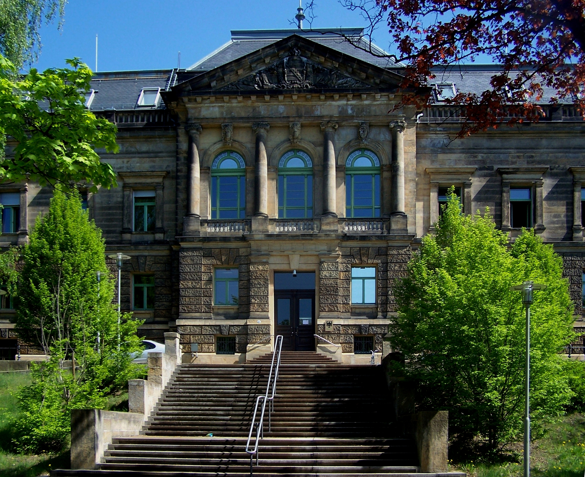 Heute ein Standort der Bundesanstalt für Arbeitsschutz und Arbeitsmedizin